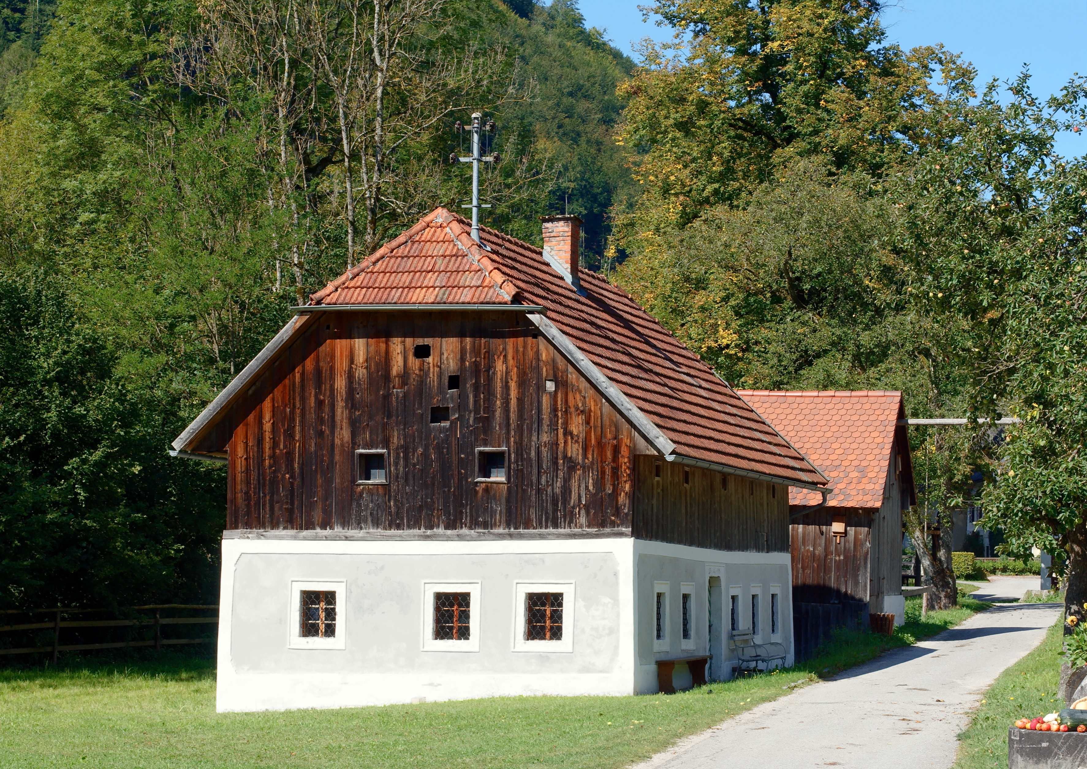 Das Helmhäusl im Freilichtmuseum Schmiedleithen (Grünburg, Oberösterreich)